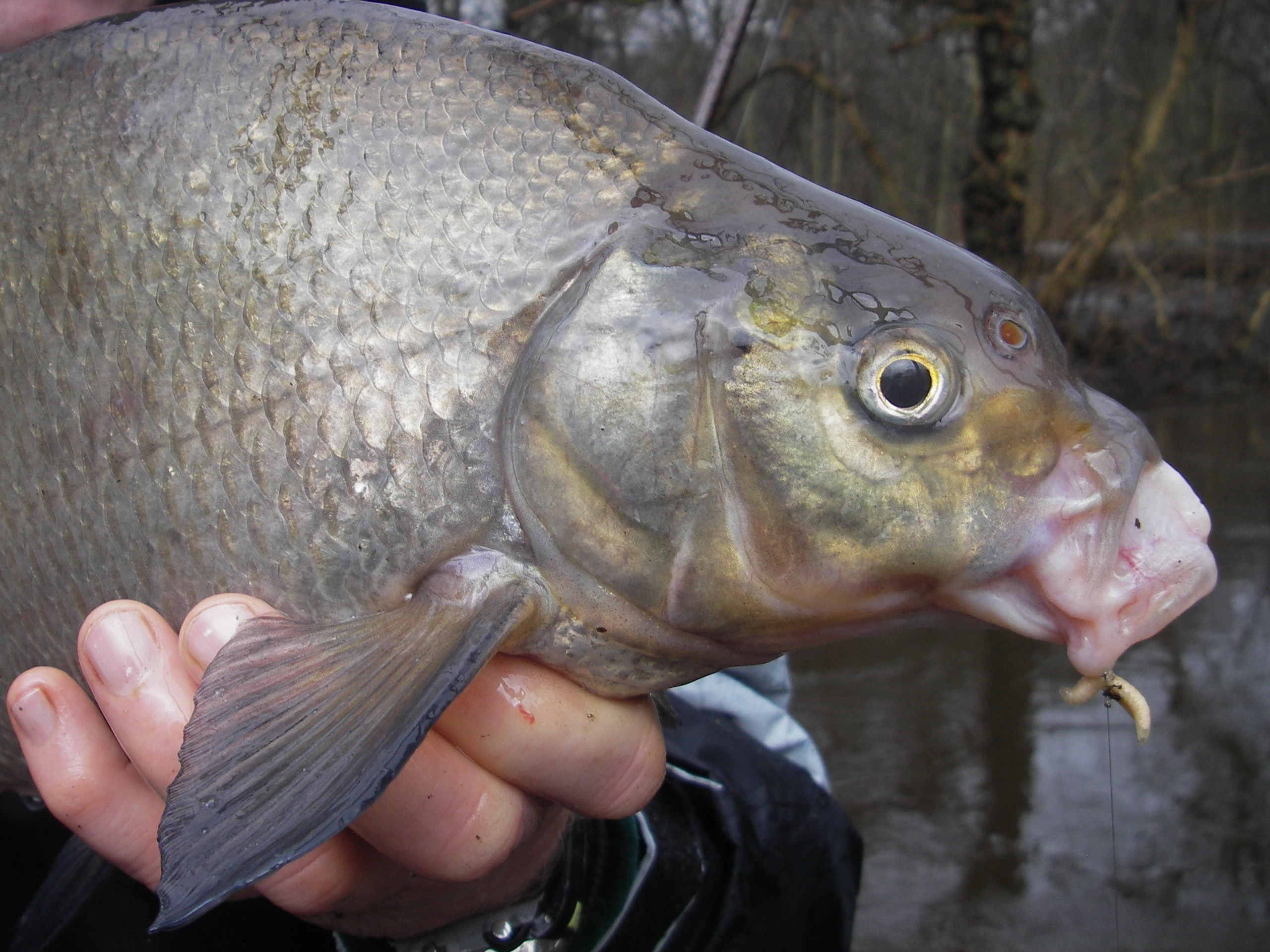 Kopfportrait eines groÃŸen Brassen (A. brama). Deutlich zu erkennen ist das weit ausfahrbare RÃ¼sselmaul